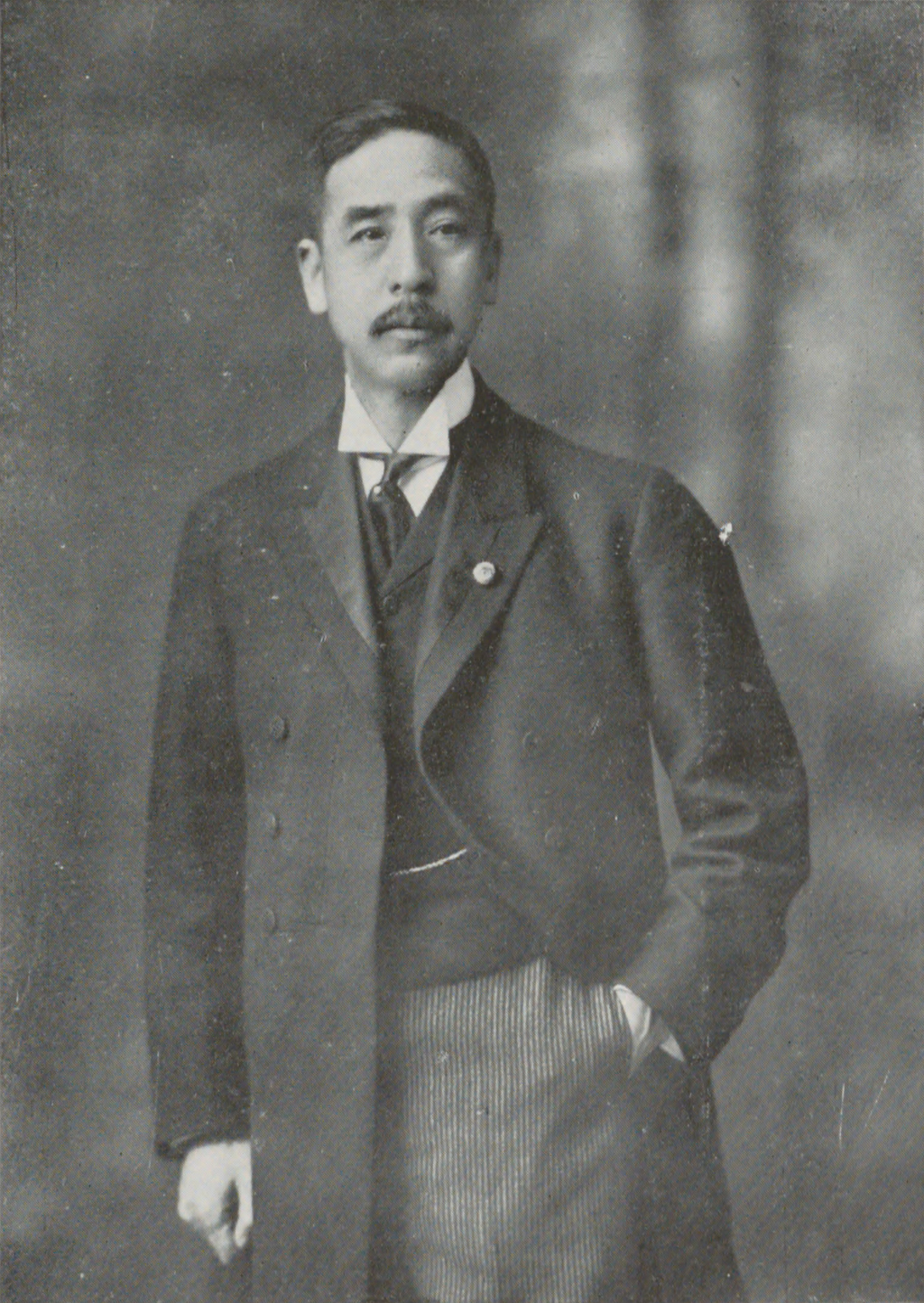 Portrait of Okazaki Kunisuke (岡崎邦輔, 1853 – 1936)